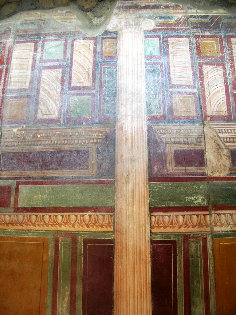 Affreschi romani nella Villa di Arianna a Stabia.